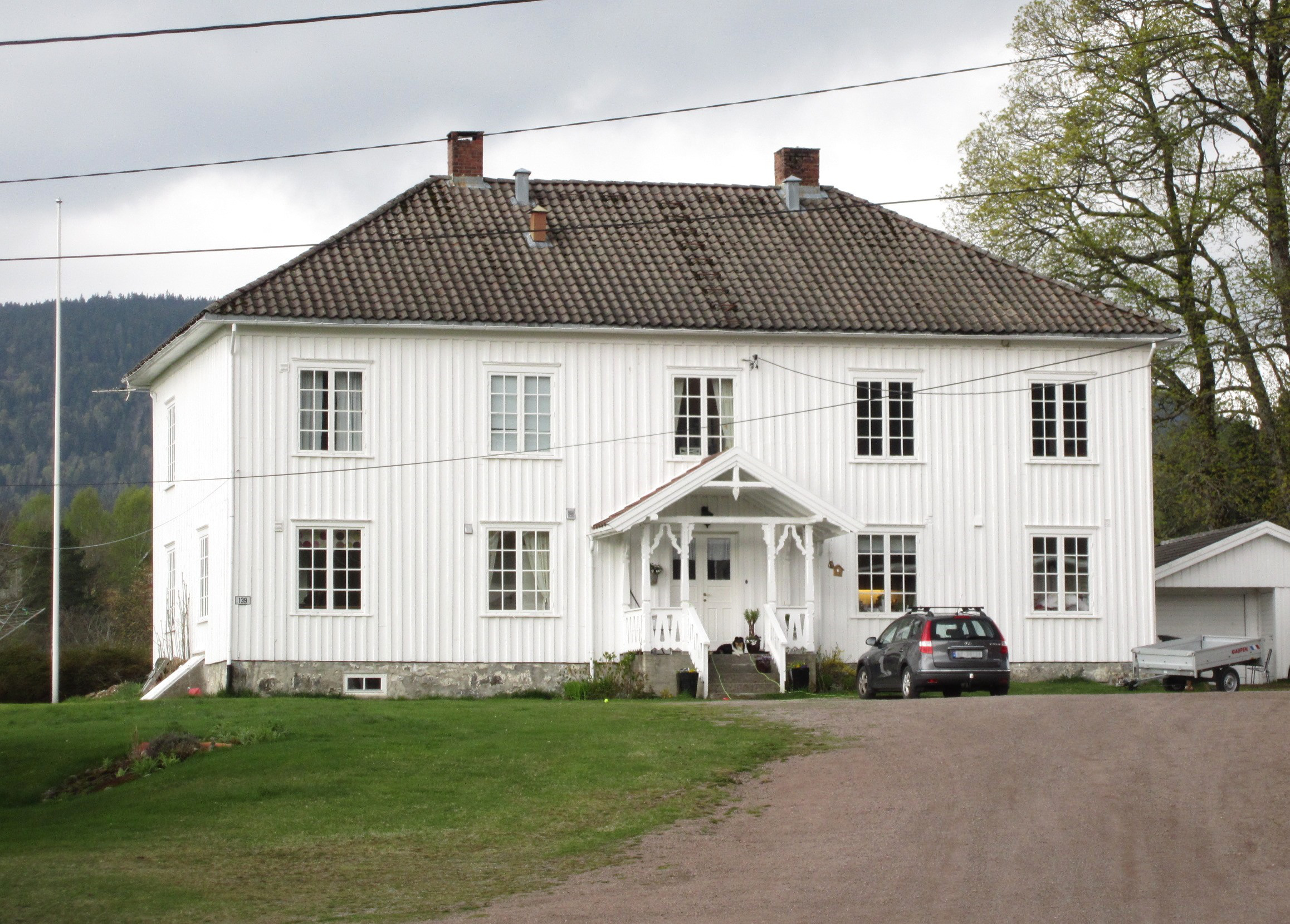 Siljan prestegård, Telemark